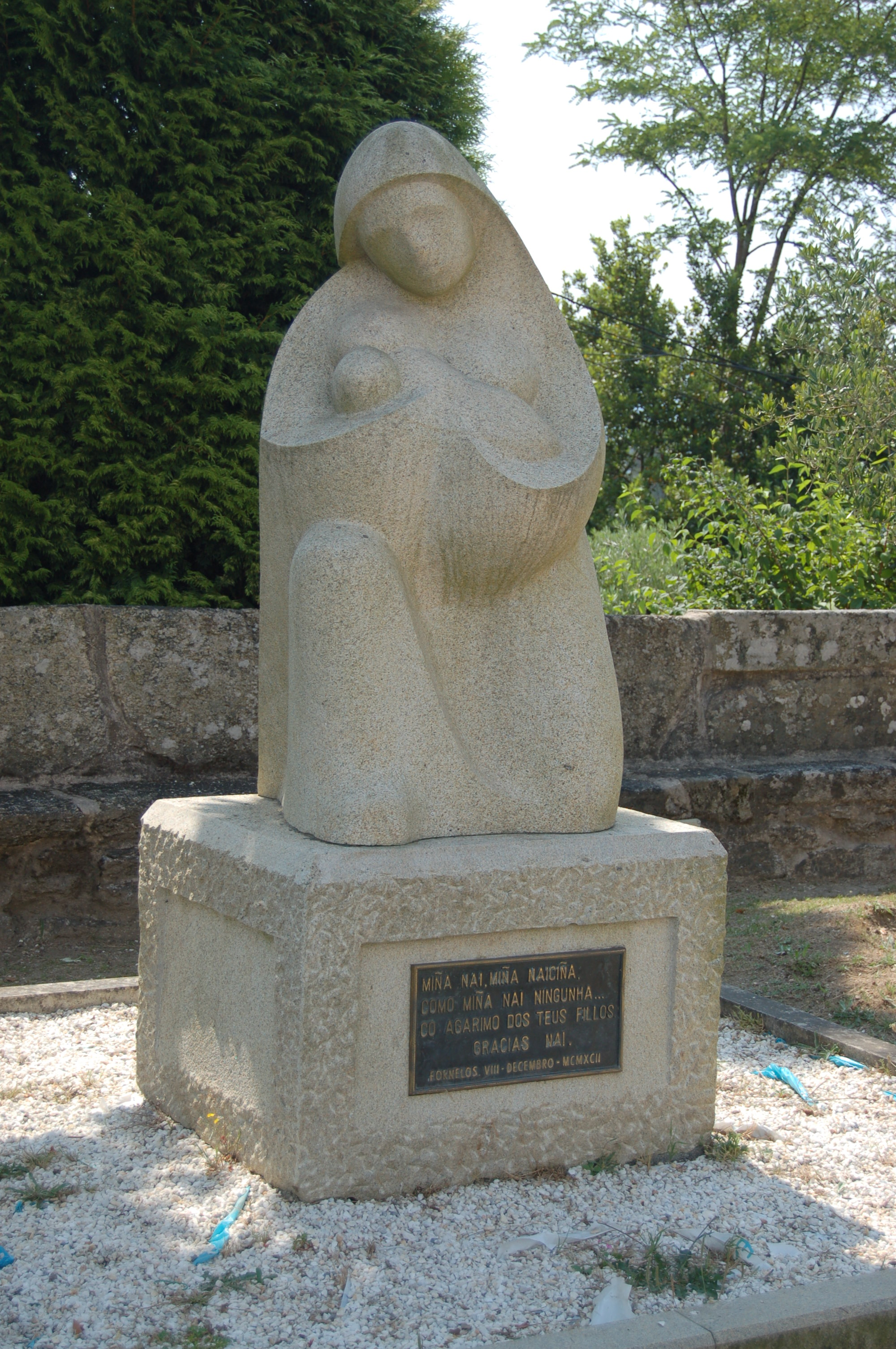 Estatua na memoria dunha nai, no adro da igrexa parroquial de Fornelos (Salvaterra de Miño)